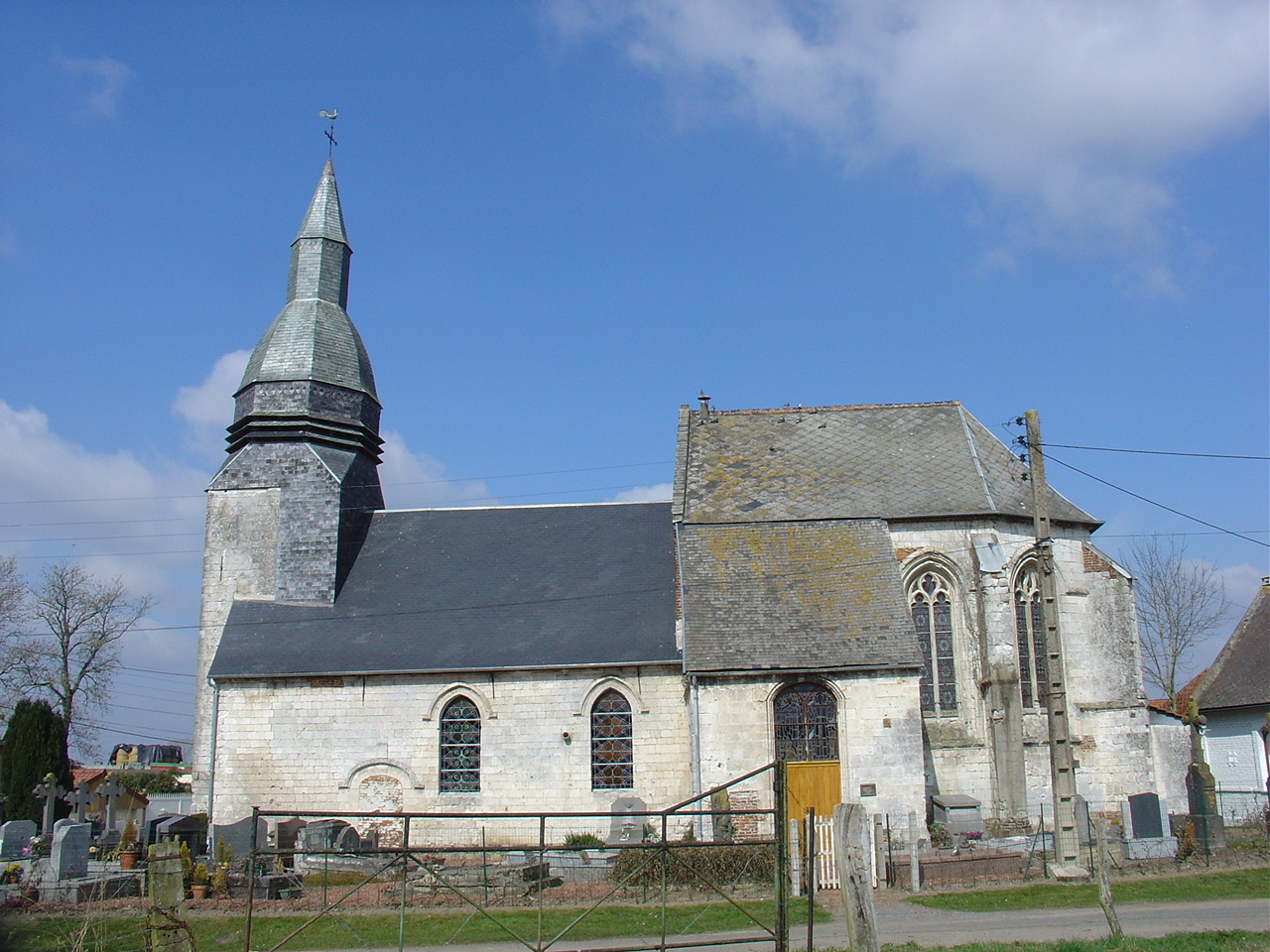 Église de Bermicourt